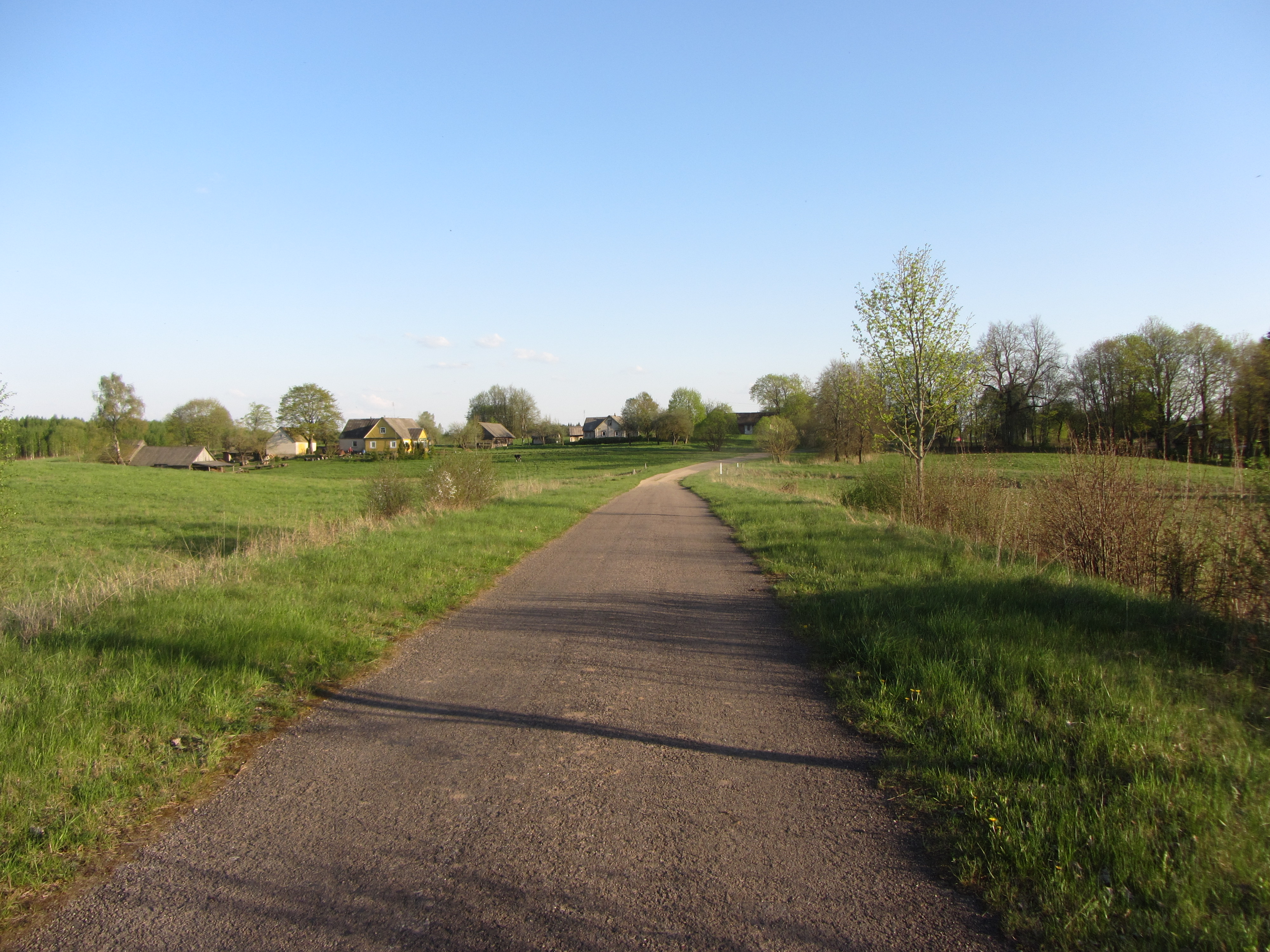 Suginčių sen., Lithuania